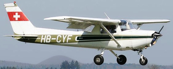 HB-CYF : indicatif radio d'un aéronef Suisse, type Cessna.